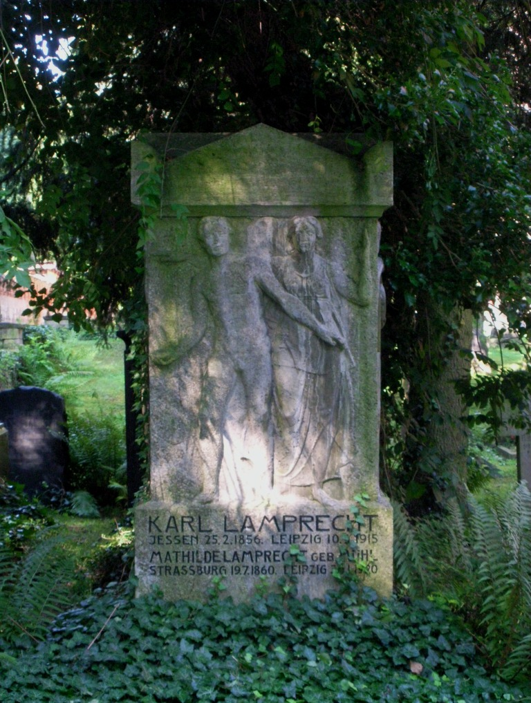 Grabstätte des Historikers Karl Lamprecht (1856-1915) in Schulpforte